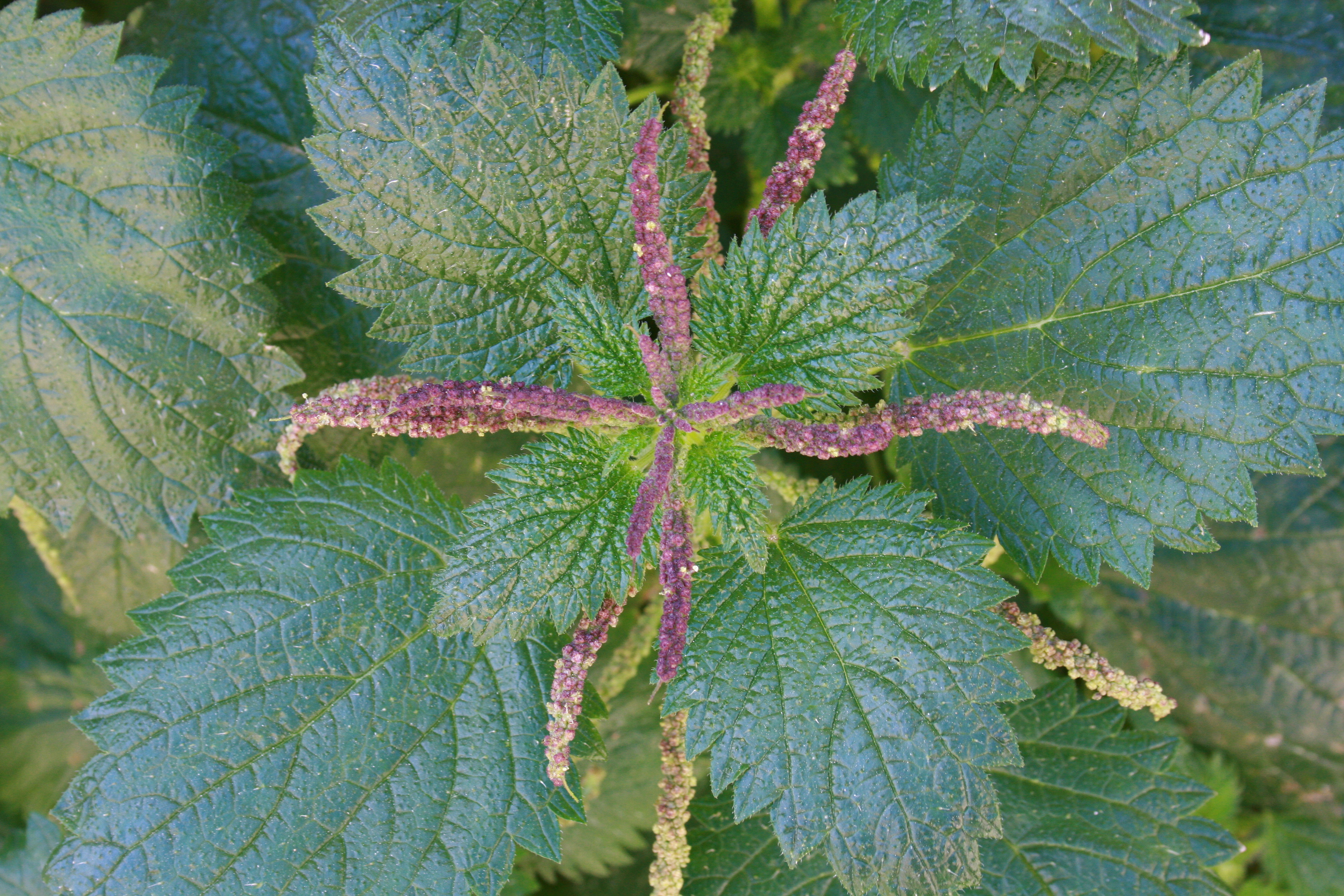 Castell de Santueri in Felanitx, Mallorca